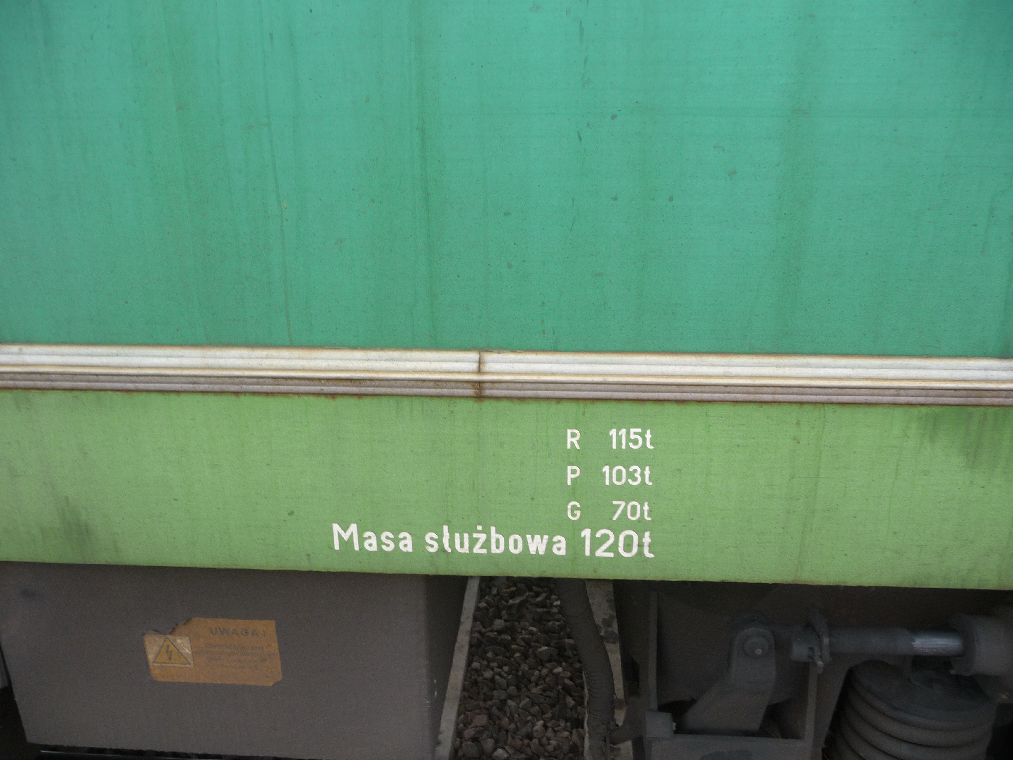 Opis "masa służbowa" na burcie elektrowozu